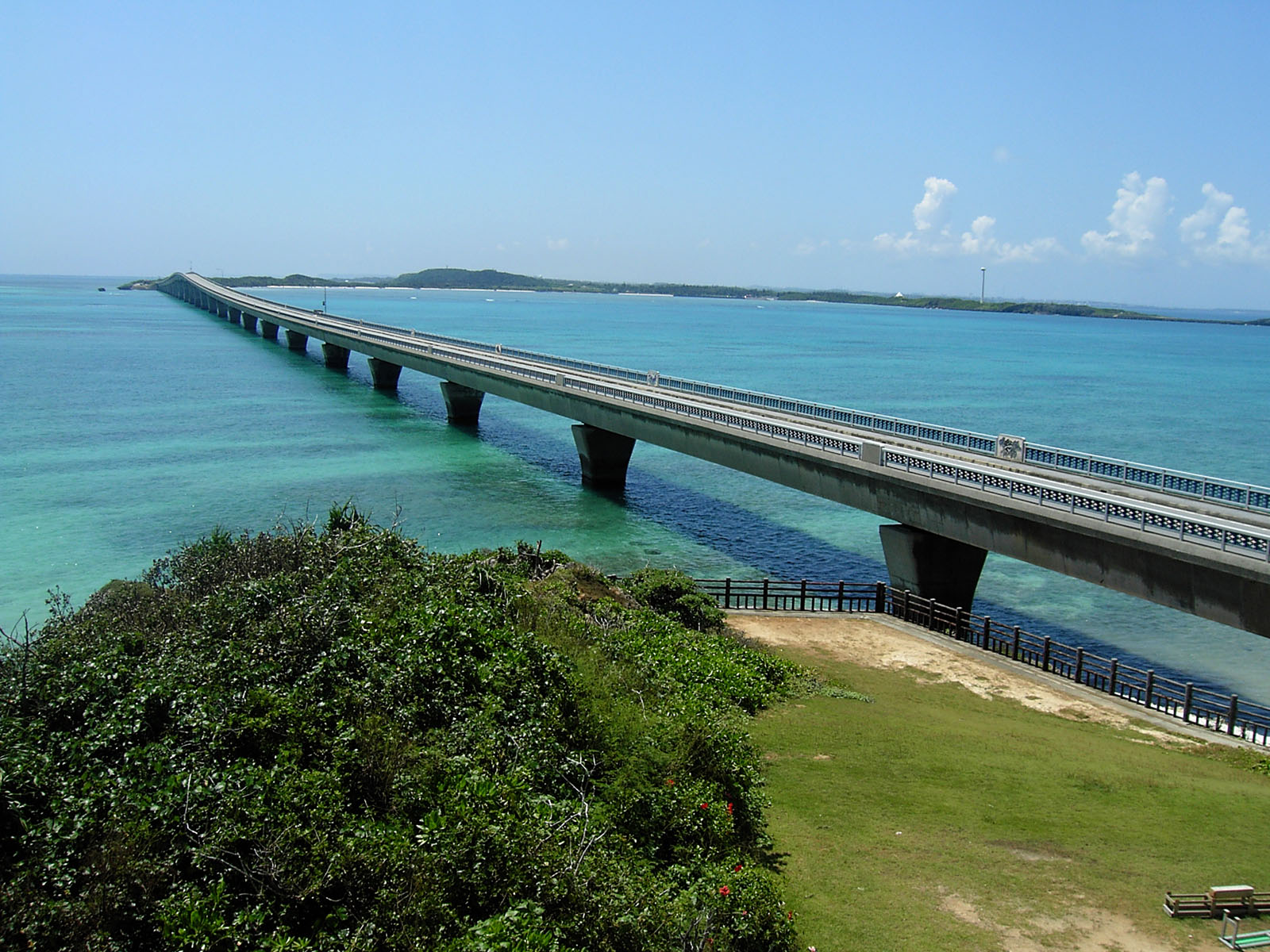 Ikema Bridge, Miyako island, Japan / 池間大橋（宮古島）